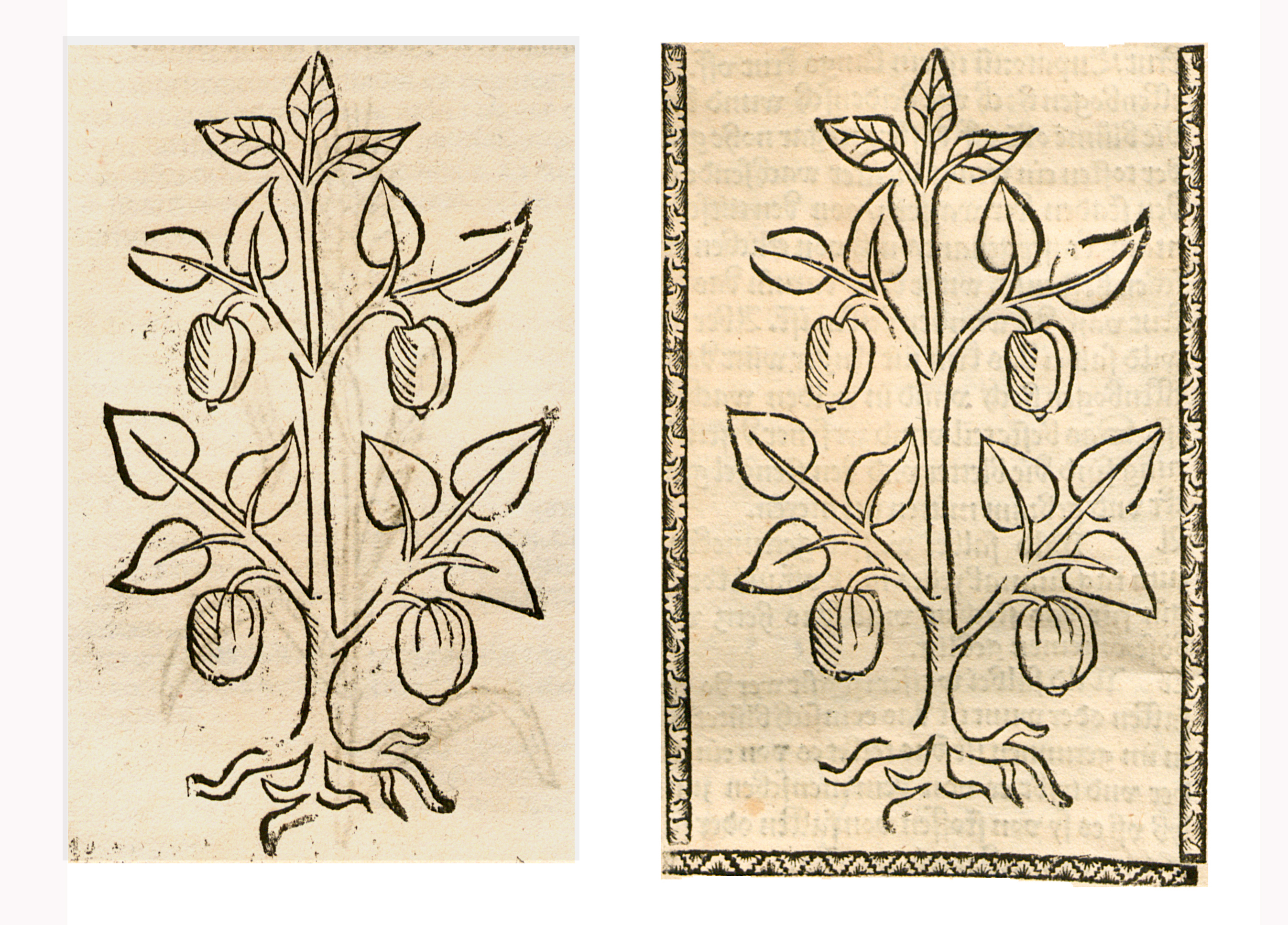 Abbildung von: Wild Bieren (Pyrus pyraster)